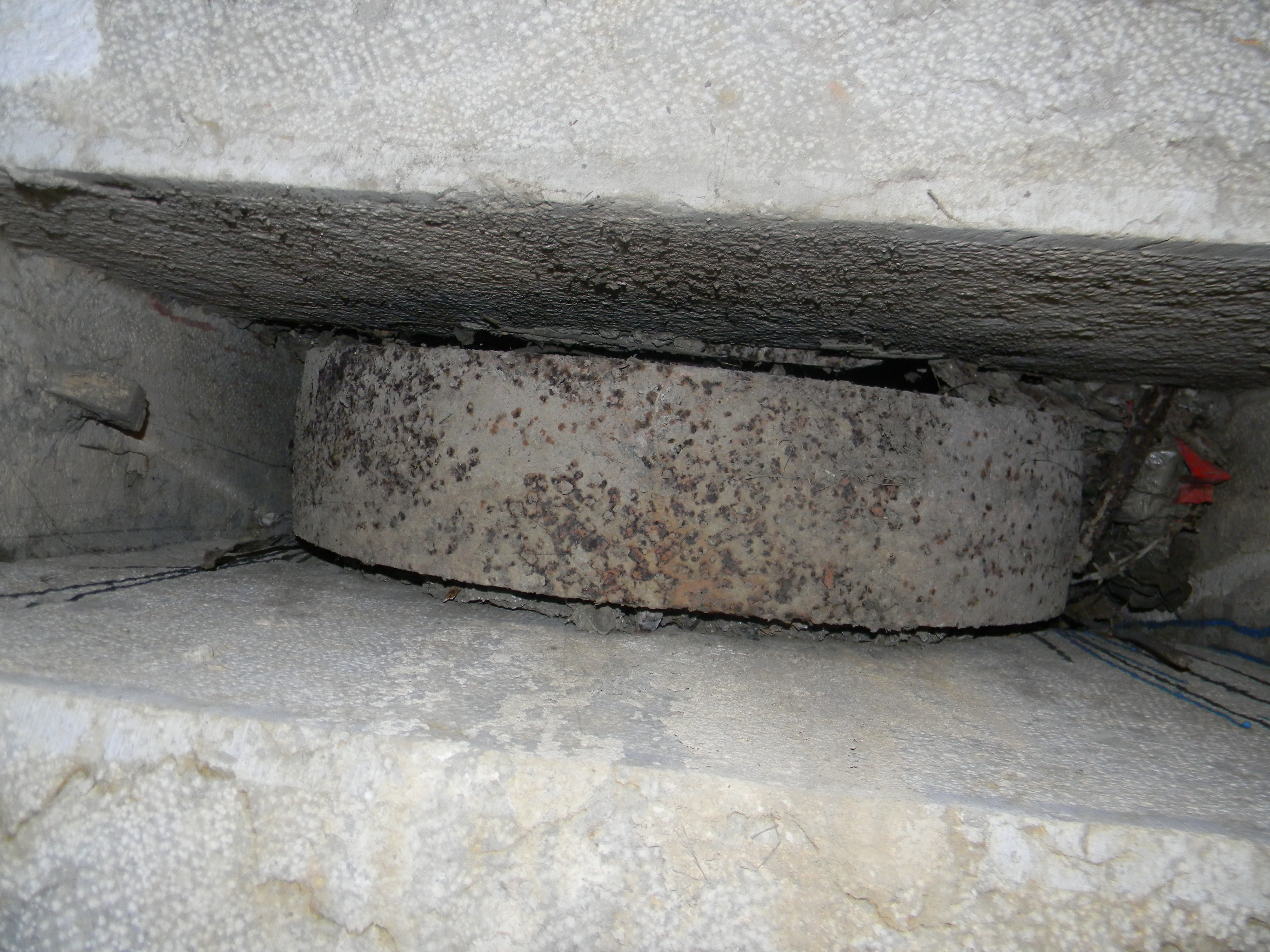 Roulement à galet pour le pont du Fort de Vancia.